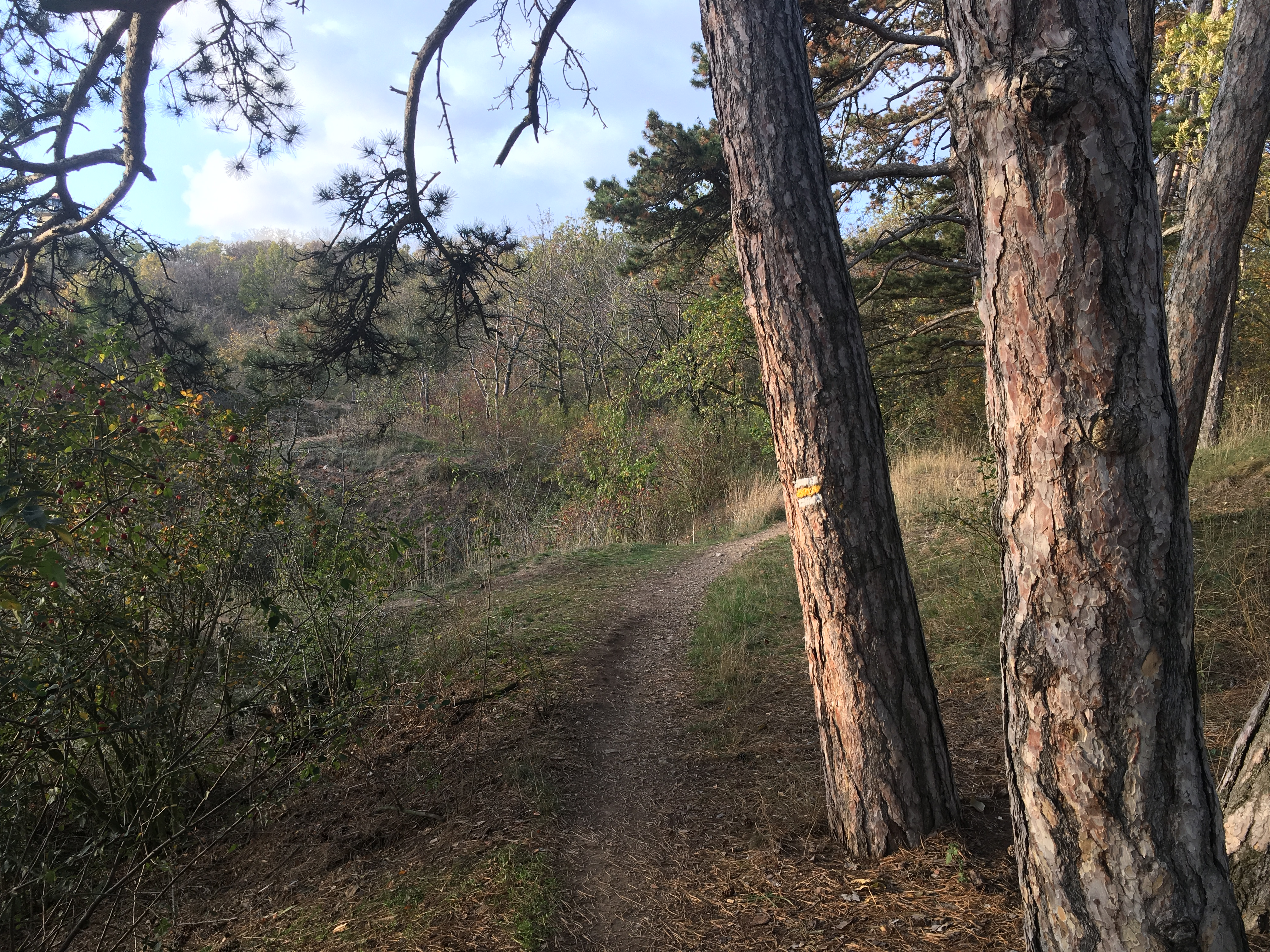 Žlutá turistická stezka okolo NPP